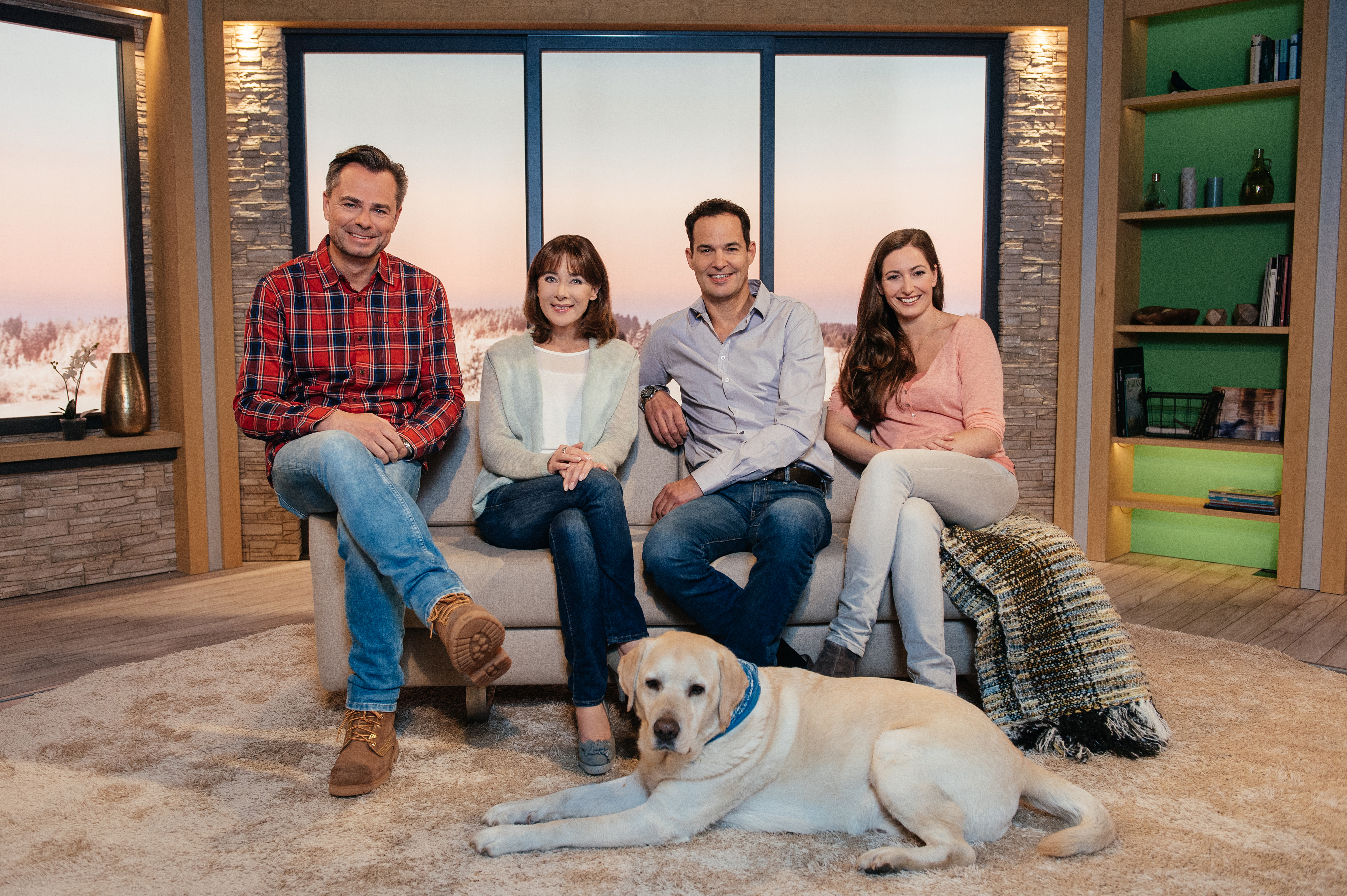 von links: Michael Sporer, Sabine Sauer, Dominik Pöll, Andrea Lauterbach